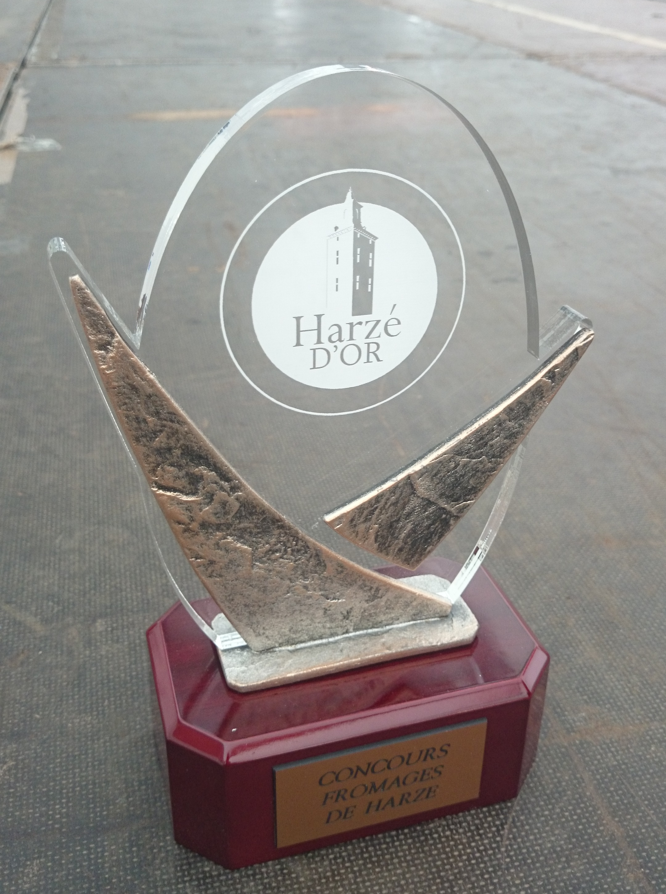 Coq d'Or au Concours des fromages d'Harzée - 2015